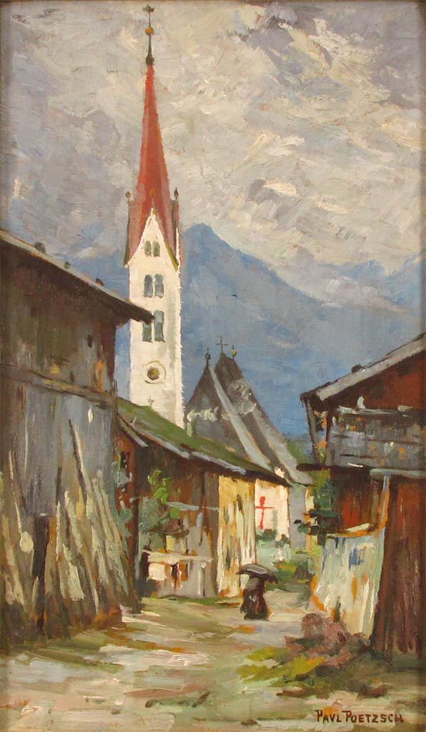 "Mieders in Tirol", Öl auf Karton, 38,5 x 23 cm